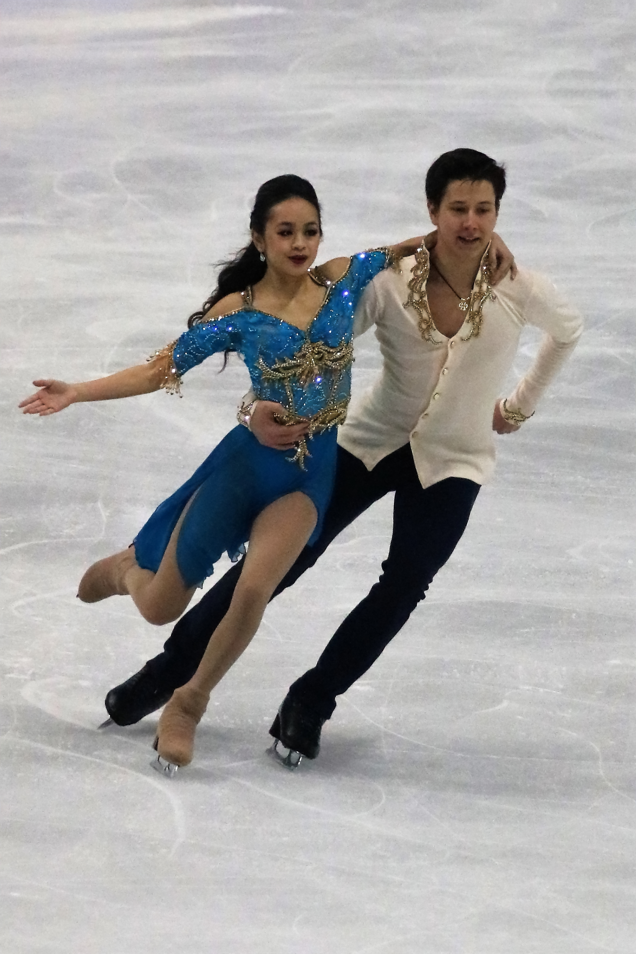 Эйвонли Нгуен и Вадим Колесник (США) на финале Гран-при среди юниоров 2019-2020